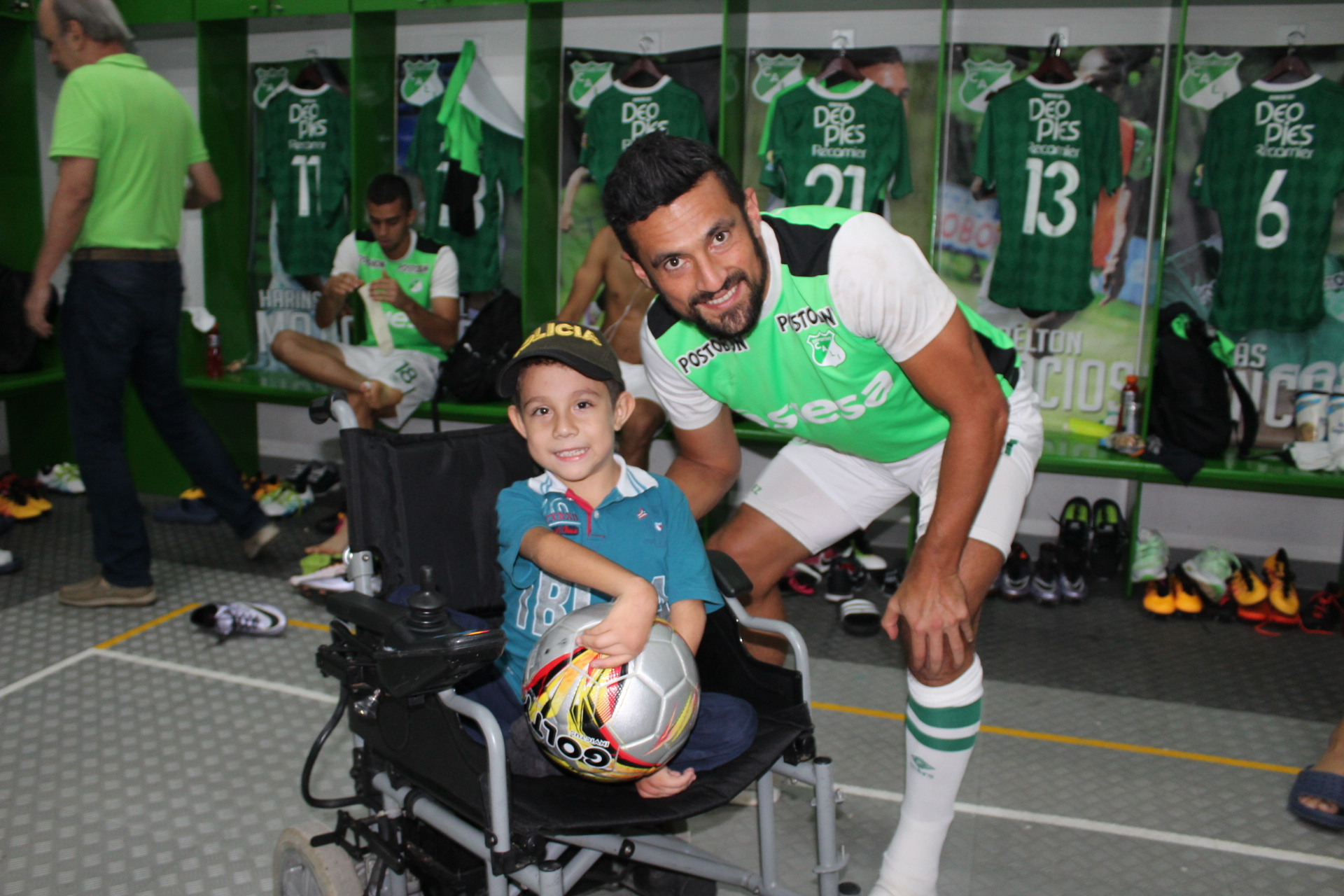 ‘Sebastián Cardona es un niño de 10 años con Artrogriposis múltiple congénita al que la Policía de Infancia y Adolescencia de Cali le cumplió un sueño. Todo inicia cuando en el evento de la celebración del día mundial de las enfermedades raras, Catalogada como una de las enfermedades huérfanas este grupo de la Policía conoció la historia del niño y decidió cumplirle su sueño de conocer a los jugadores del Deportivo Cali y poder entrar a los camerinos del equipo de futbol, además de recibir por parte de todos un balo firmado por cada uno de los jugadores y la camiseta original del equipo del cual es hincha. Sebastián quien quiere ser arquero de futbol cumplió su sueño y agradeció a los uniformados por esta labor.’